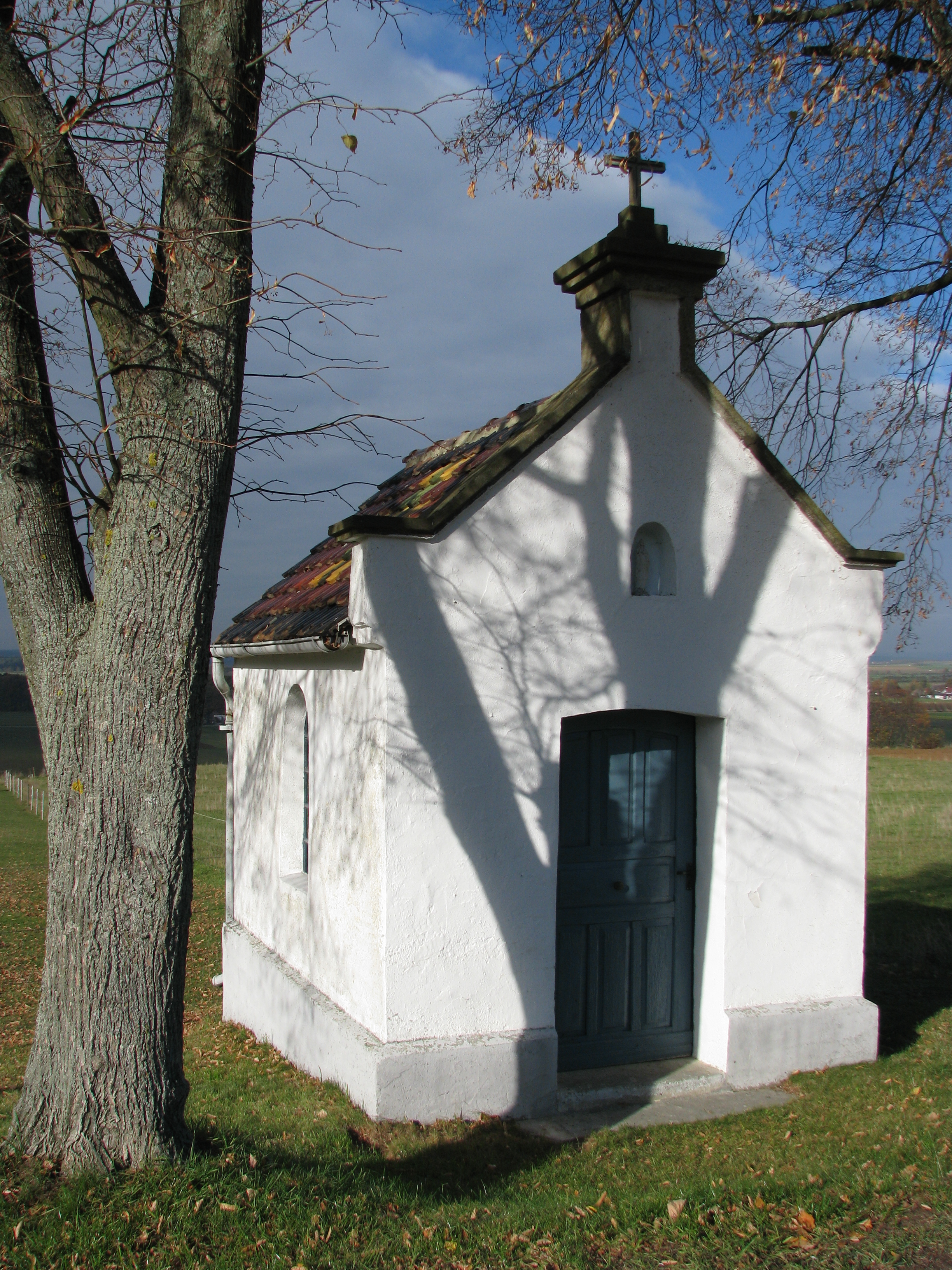 Lauterbach, Ortsteil von Freystadt im Landkreis Neumarkt in der Oberpfalz, Bayern, Herz Jesu-Kapelle an der Straße nach Jettenhofen